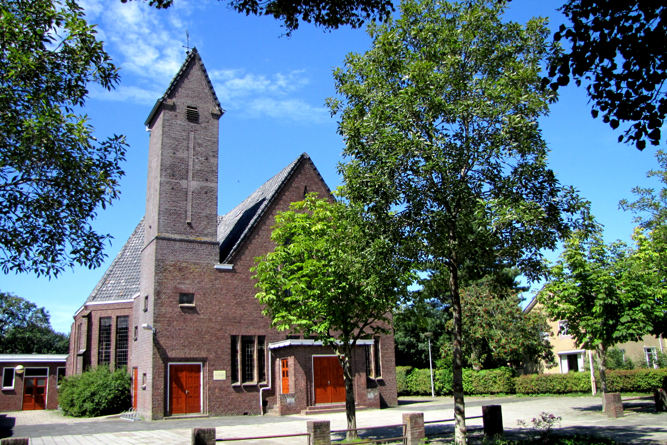 Sexbierum. Kirche.